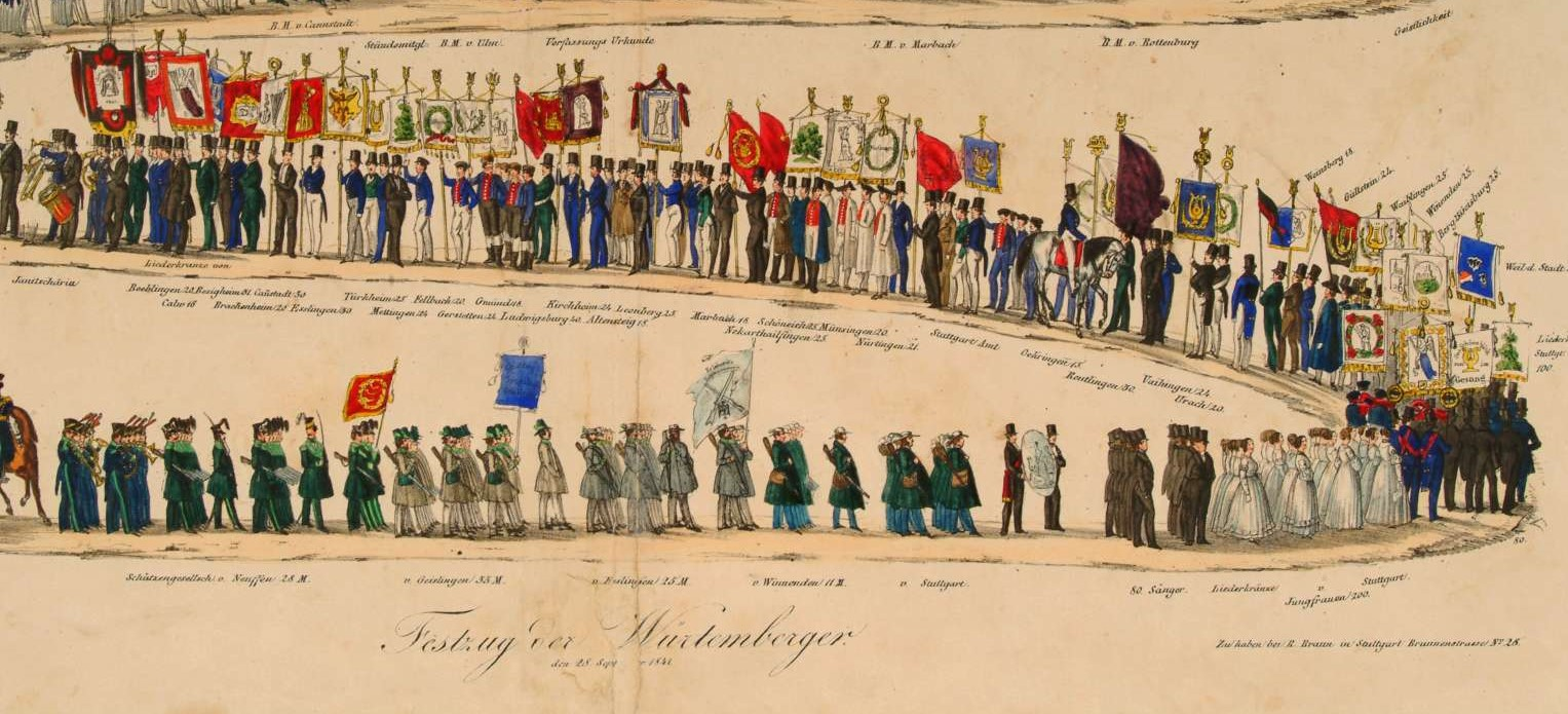 Festzug der Württemberger am 28.9.1841 zum 25-jährigen Regierungsjubiläum von König Wilhelm I.